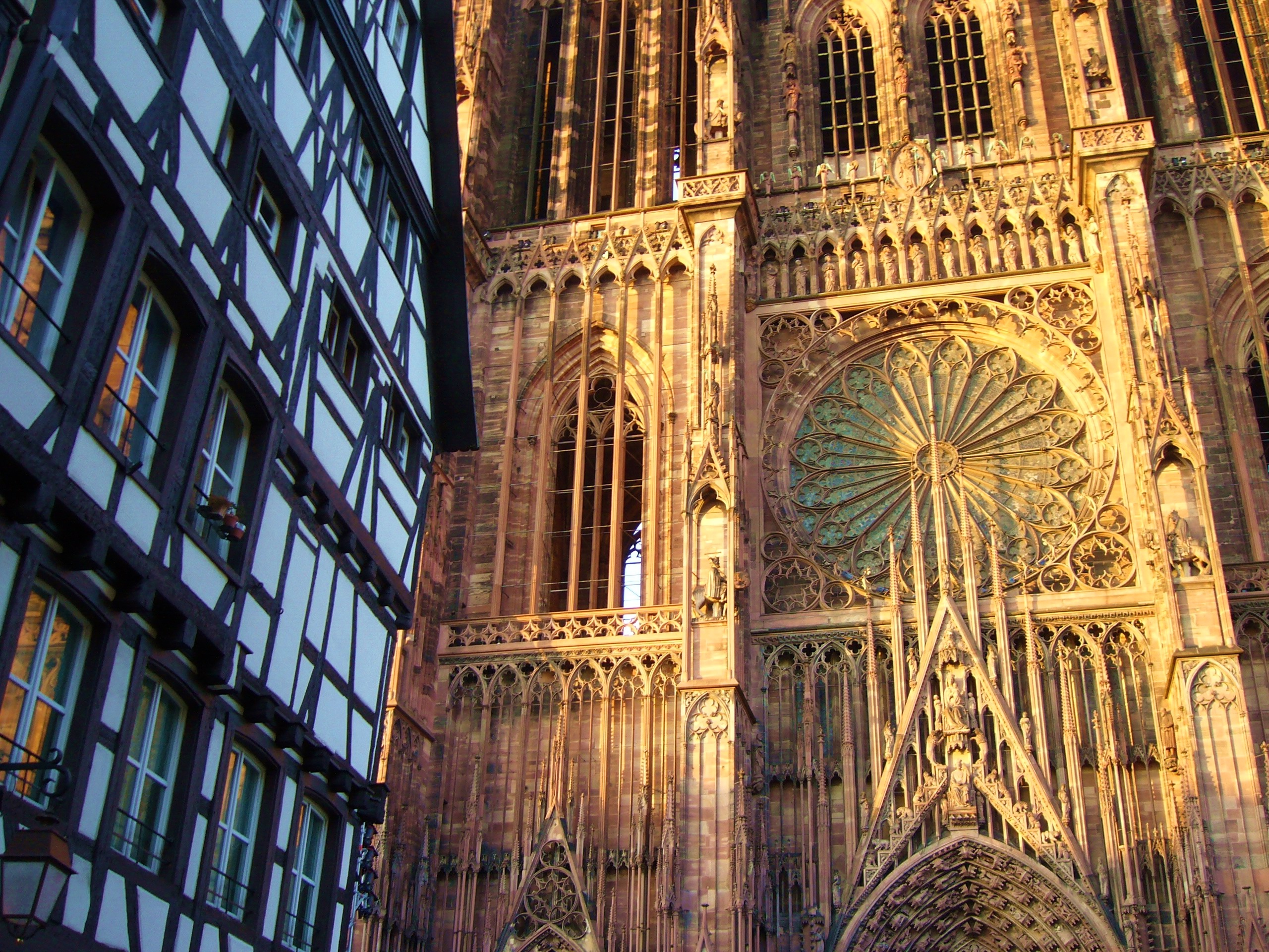 La facade de la cathédrale de Strasbourg